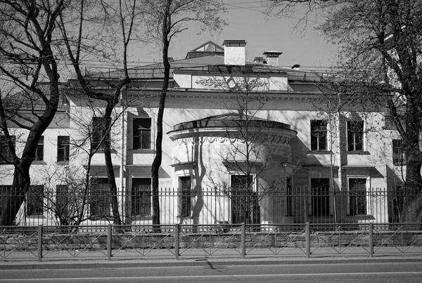 В этом здании находился Музей почвоведения в 1902-1912 г.г.